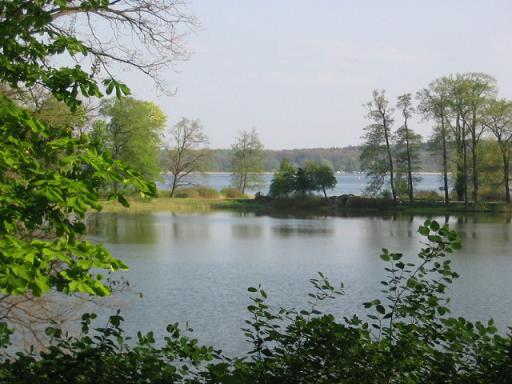 Petzow, Brandenburg. Schlosspark von Lenne, Hintergrund Schwielowsee